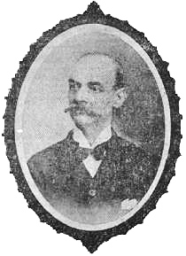 Retrato de Jeronimo de la Ossa